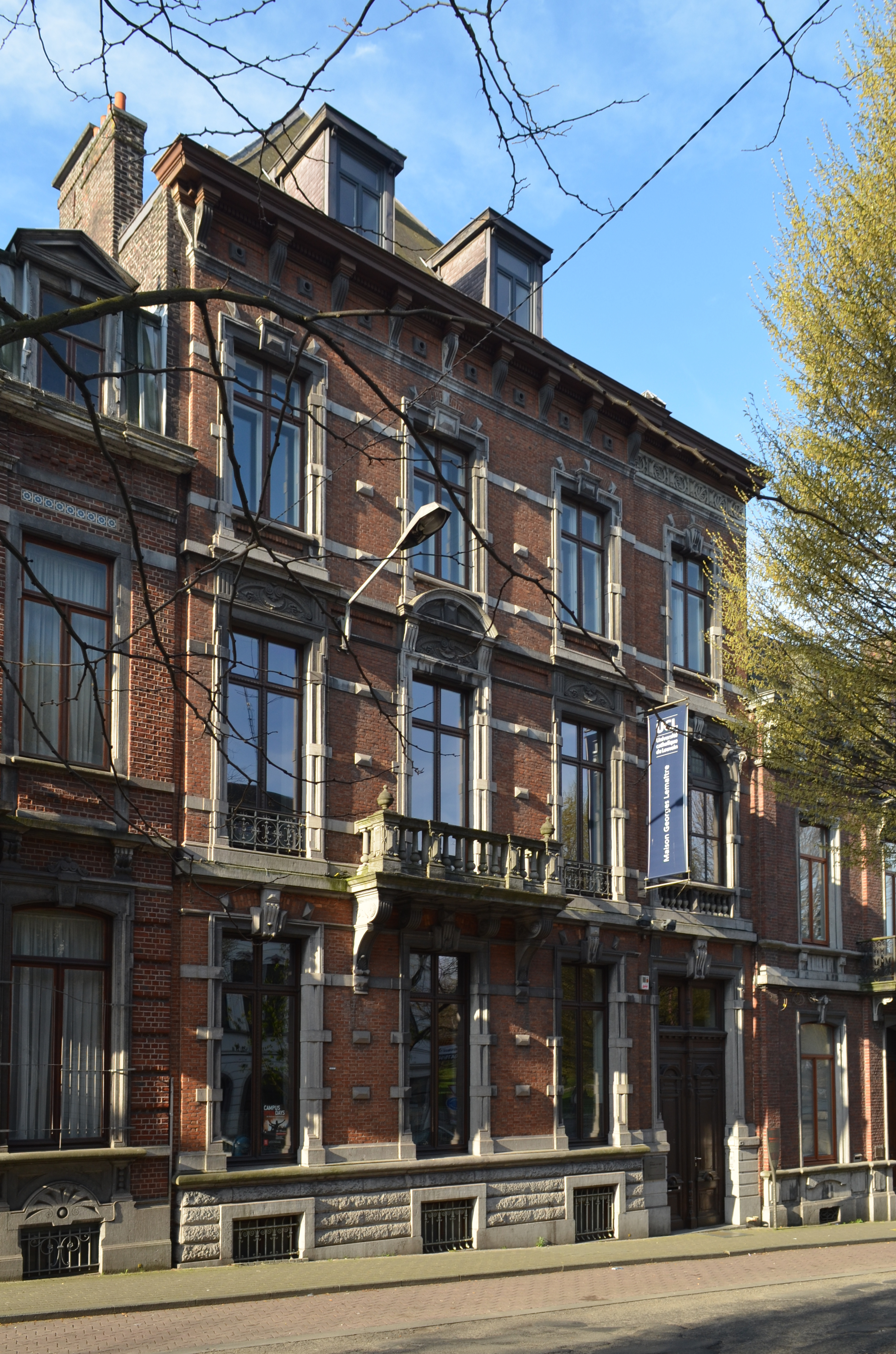 Charleroi - boulevard Émile Devreux 6 - maison de style éclectique construite en 1882 par Auguste Cador pour l'avocat Paul François. Cette maison est actuellement occupée par l'Université catholique de Louvain et porte le nom de "Maison Georges Lemaître" en hommage à l'astro-physicien belge.